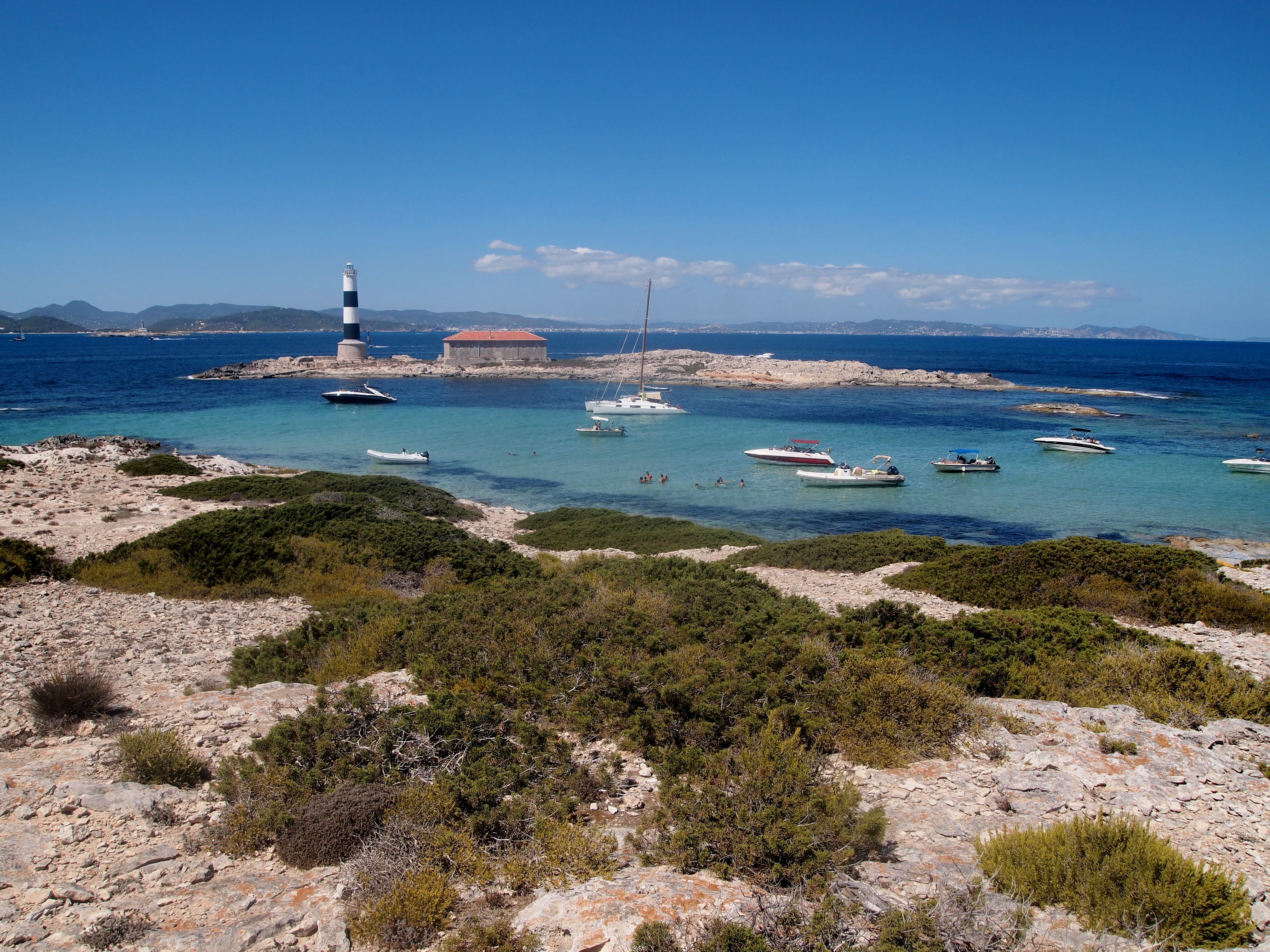 Foto presa aquest estiu per mi des de sa Torreta, Espalmador. A la imatge s'hi veu l'illa des Porcs, el freu des Far, les seques des Porcs, i al fons Eivissa i també l'illa des Penjats delimitant així el freu Gros.